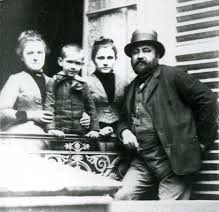 Albert Fernique, sa femme et ses enfants